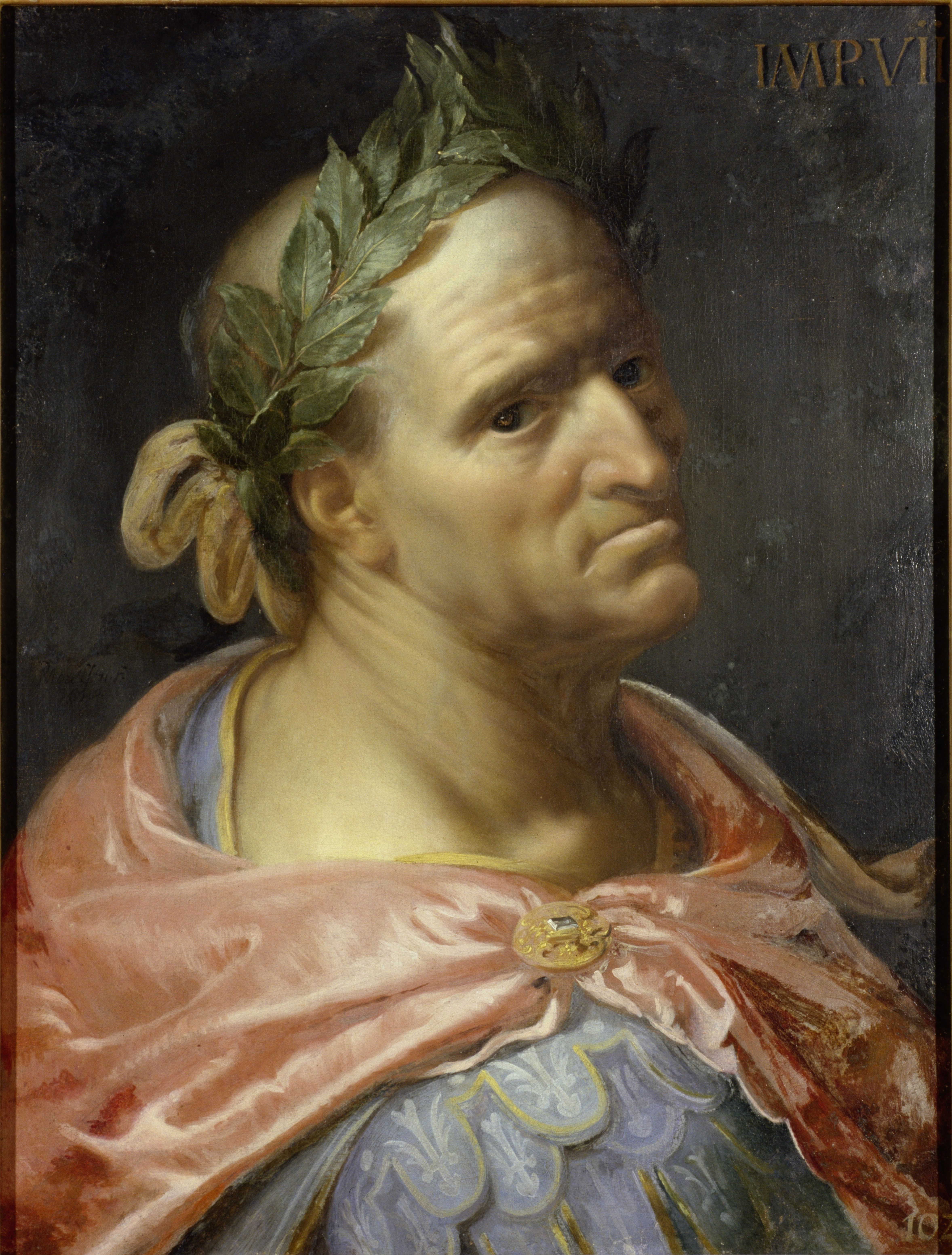 Teil einer Serie römischer Kaiserporträts niederländischer und flämischer Maler